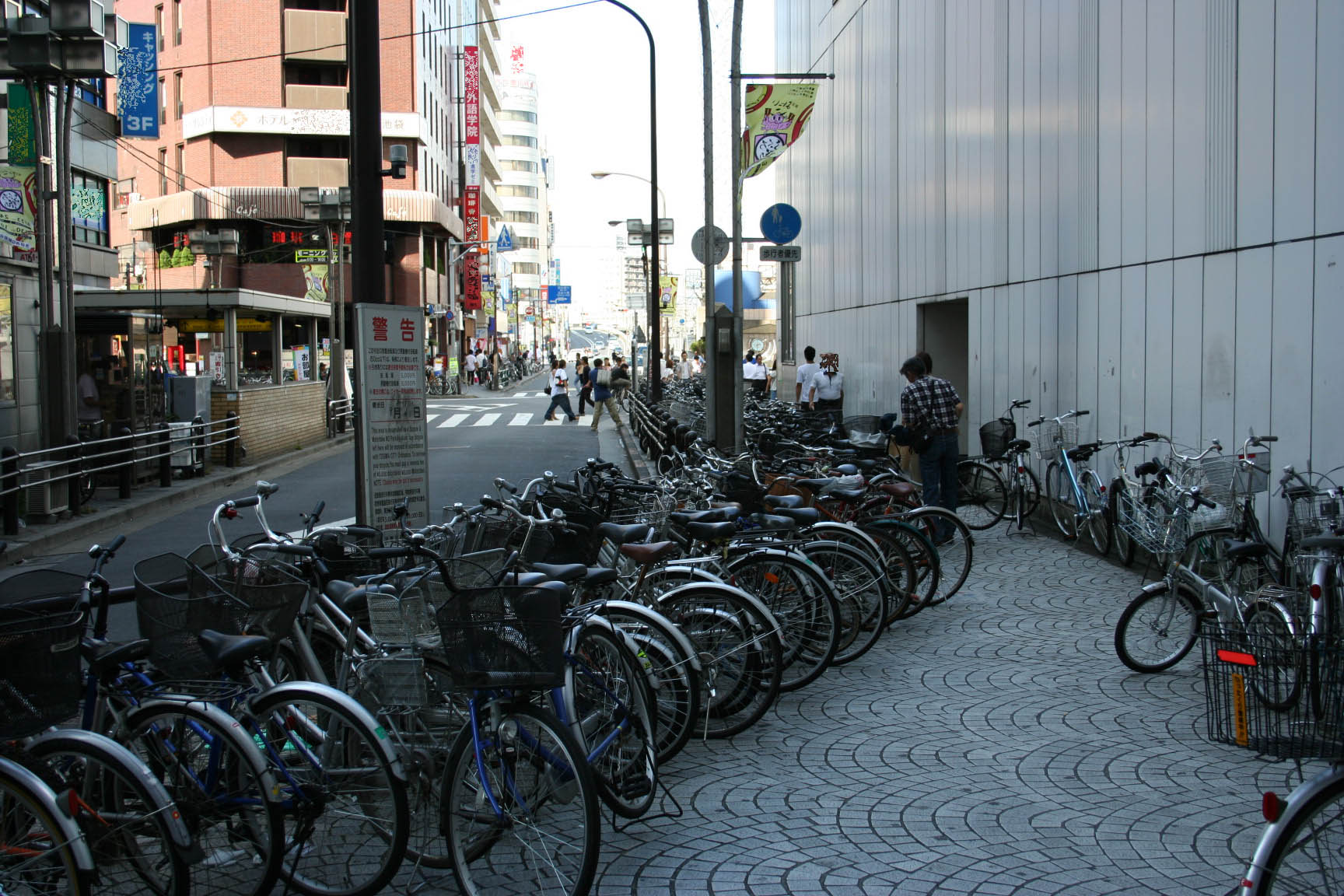 Illegal parking of bicycles at Ikebukuro Station, Toshima-ku, Tokyo, Japan.